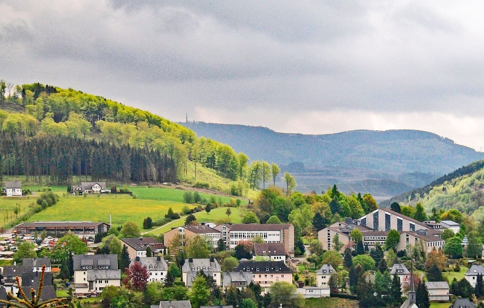 Berufskolleg und Bergkloster inBestwig (Germany)